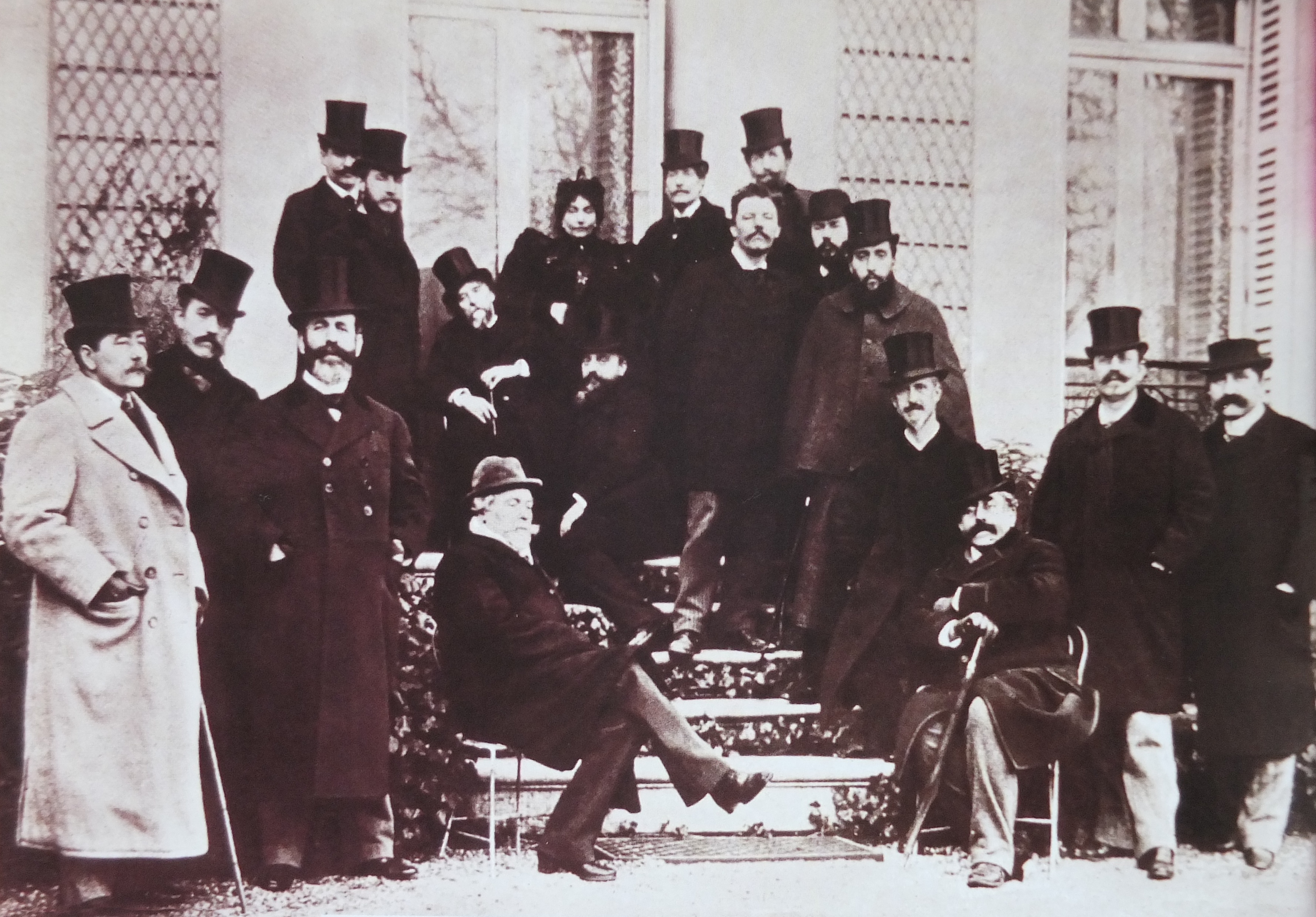 Photo prise par lecomte Joseph Napoléon Primoli : Le perron d'Edmond de Goncourt en 1890 - On y voit, de gauche à droite : Jean Ajalbert, Henri de Régnier, Jean-François Raffaëlli, Léon Daudet, Roger Max, Alphonse Daudet, Edmond de Goncourt, Madame Daudet, J.H.Rosny aîné, Georges Rodenbach, Eugène Carrière, Frantz Jourdain, Gustave Geffroy, Georges Lecomte, Gustave Toudouze, Paul Alexis, Léon Hennique et François de Nion. Publication originale dans L'Illustration.